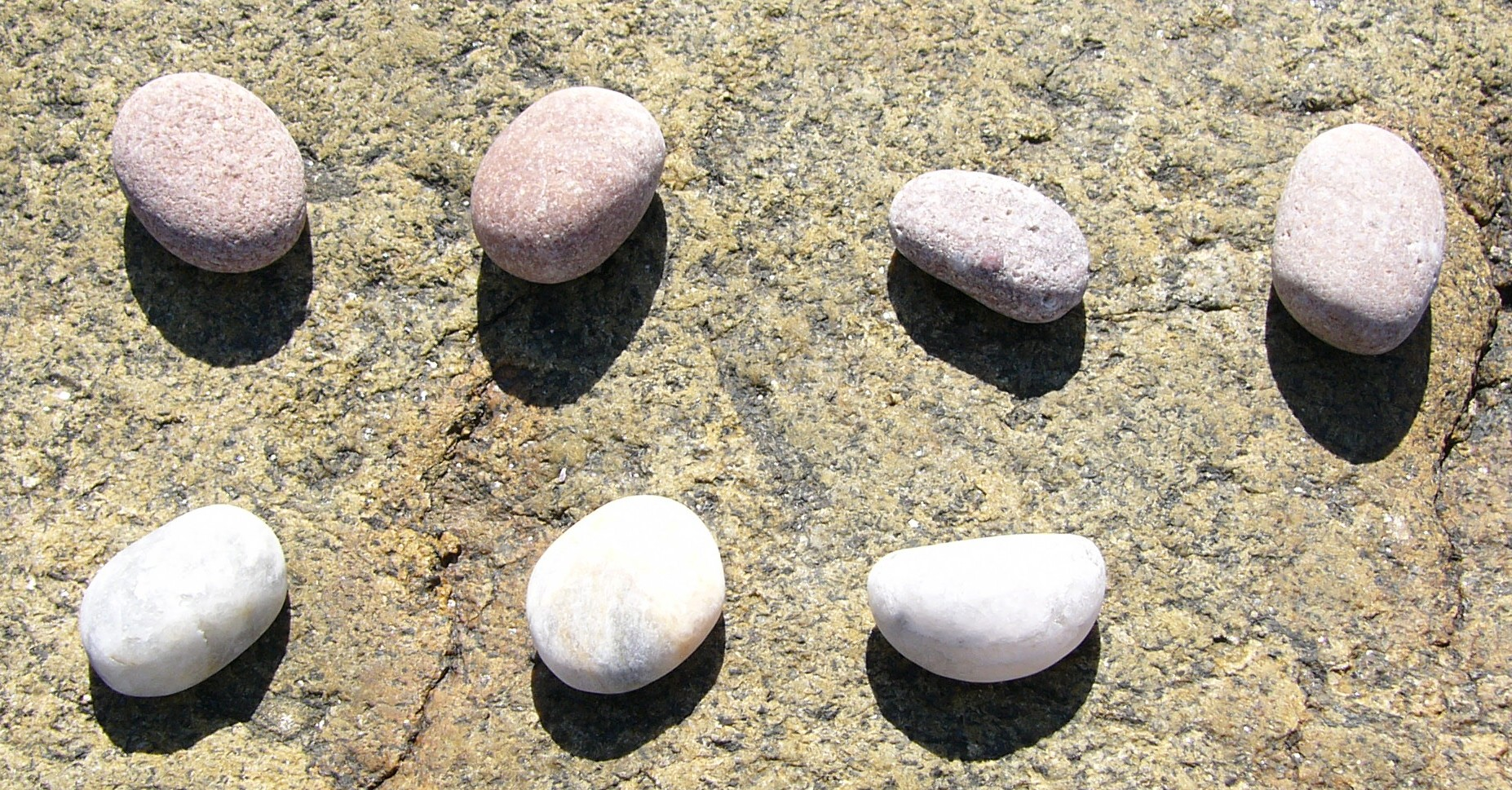 Petits galets Auteur : Rv